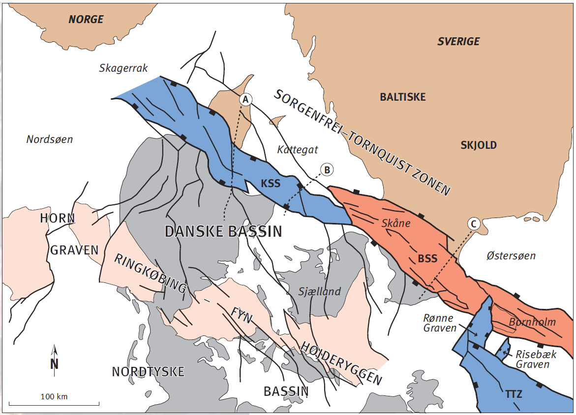 Geologiske regioner i Danmark, side 3